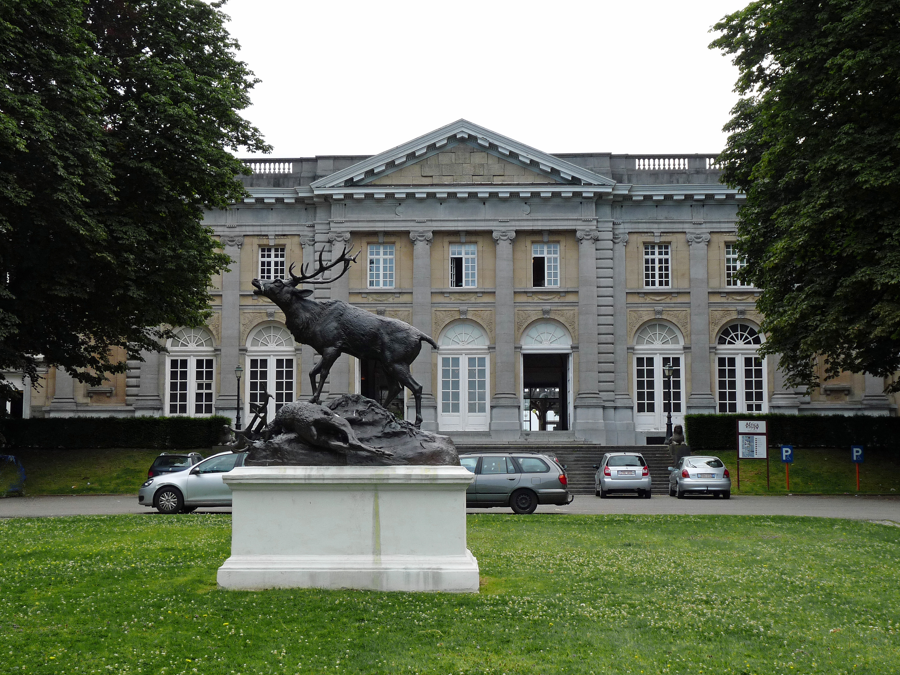 Tervuren (Belgique) : ancien Palais des Colonies ; sculpture animalière de Charles Vicomte du Passage intitulée "Après le combat" et représentant un cerf bramant. Cette statue, qui se trouvait à cet emplacement depuis 1893, était très endommagée par la rouille et le gel et a été remplacée par une réplique en bronze en 2010.